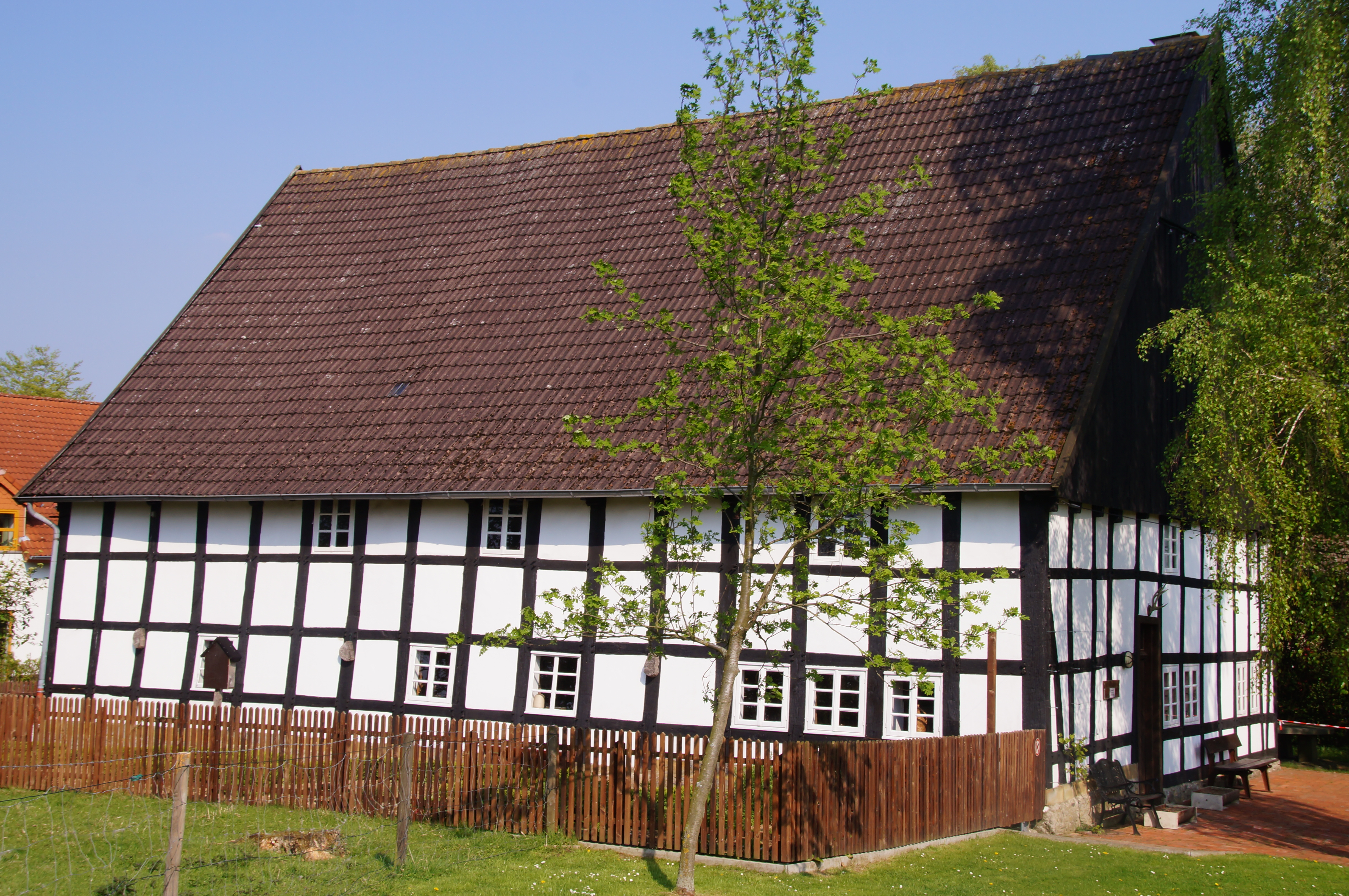 Heimathof in Leopoldshöhe, Germany This is a photograph of an architectural monument.